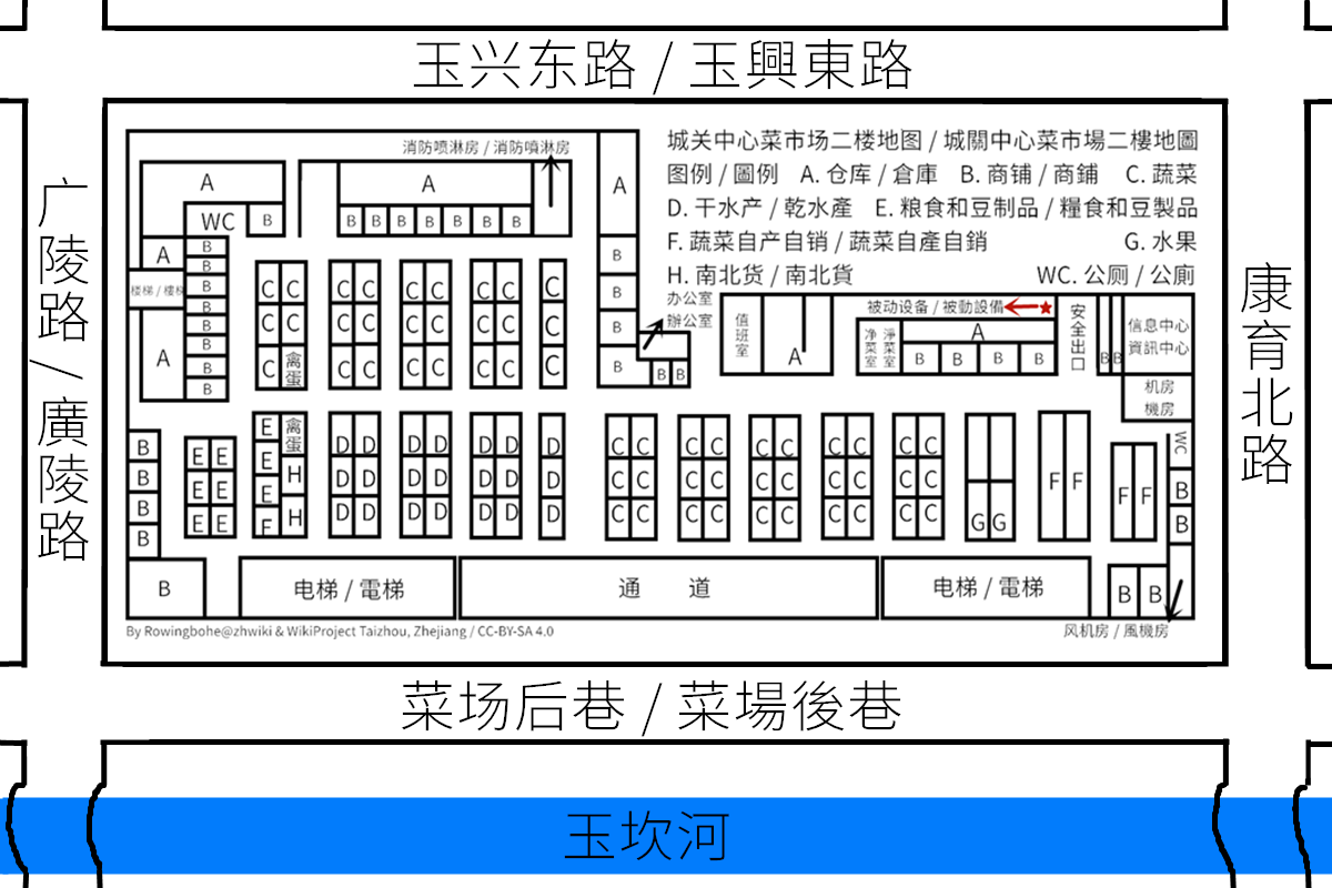 中文（中国大陆）: 玉环城关中心菜市场地图，据@玉环发布《玉环市确诊一例新冠肺炎病例》绘制，使用思源黑体 Normal 字体